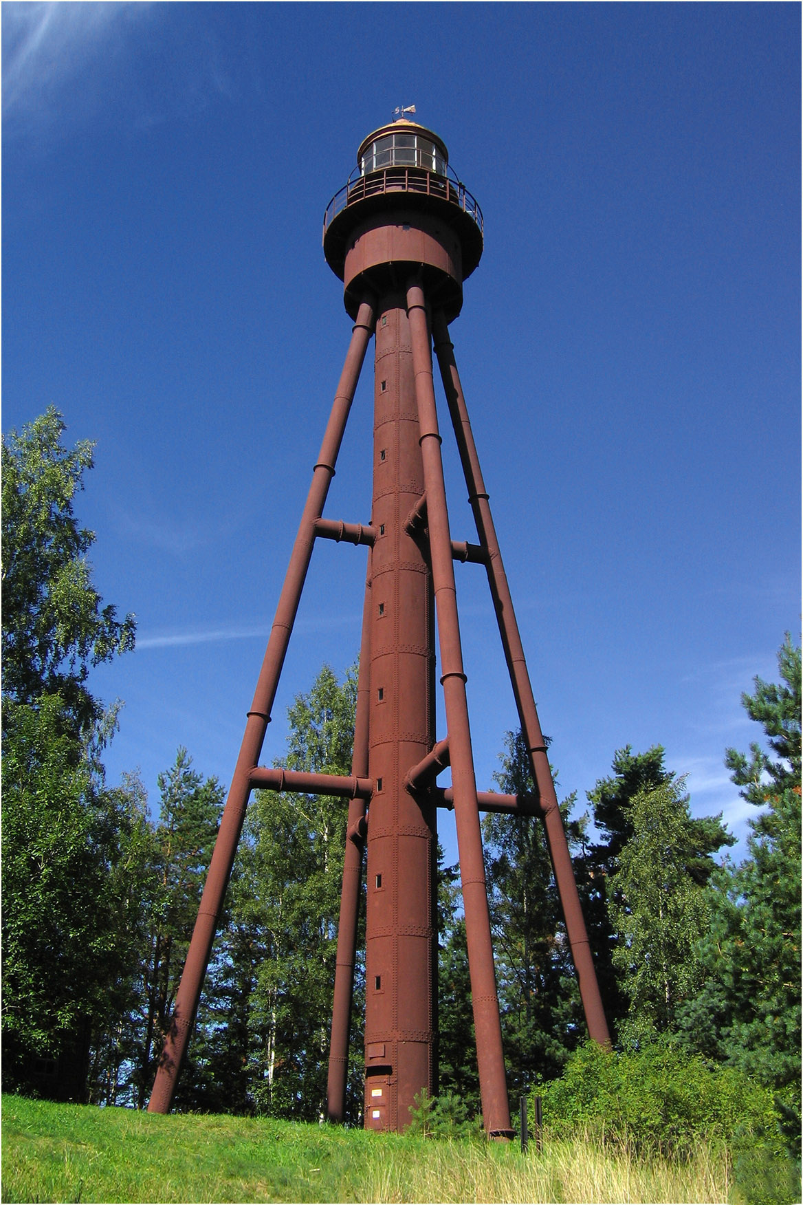 Ruhnu tuletorn